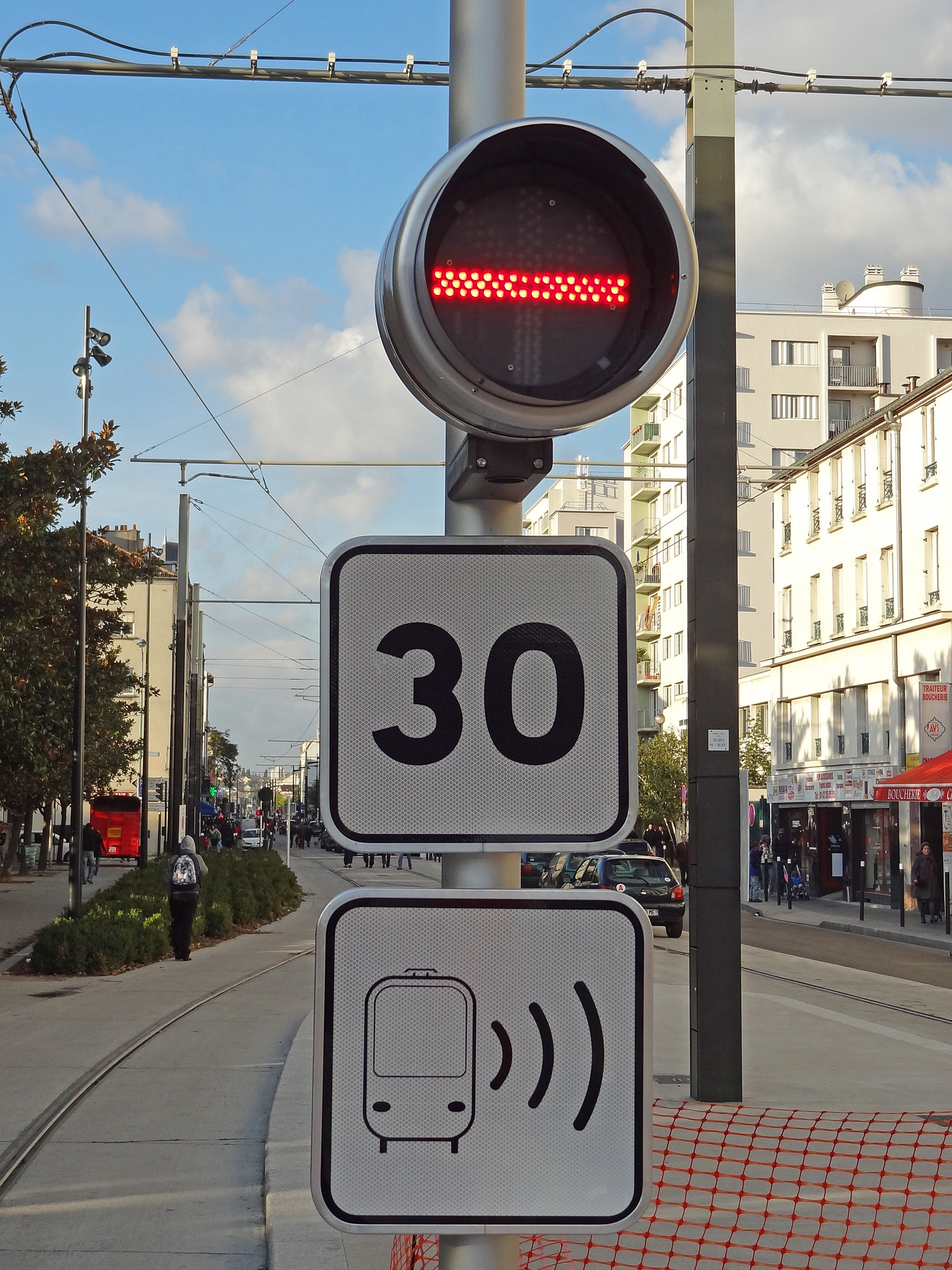 Signalisation à la station Marché de Saint-Denis du tramway T5, Saint-Denis (Seine-Saint-Denis), France.